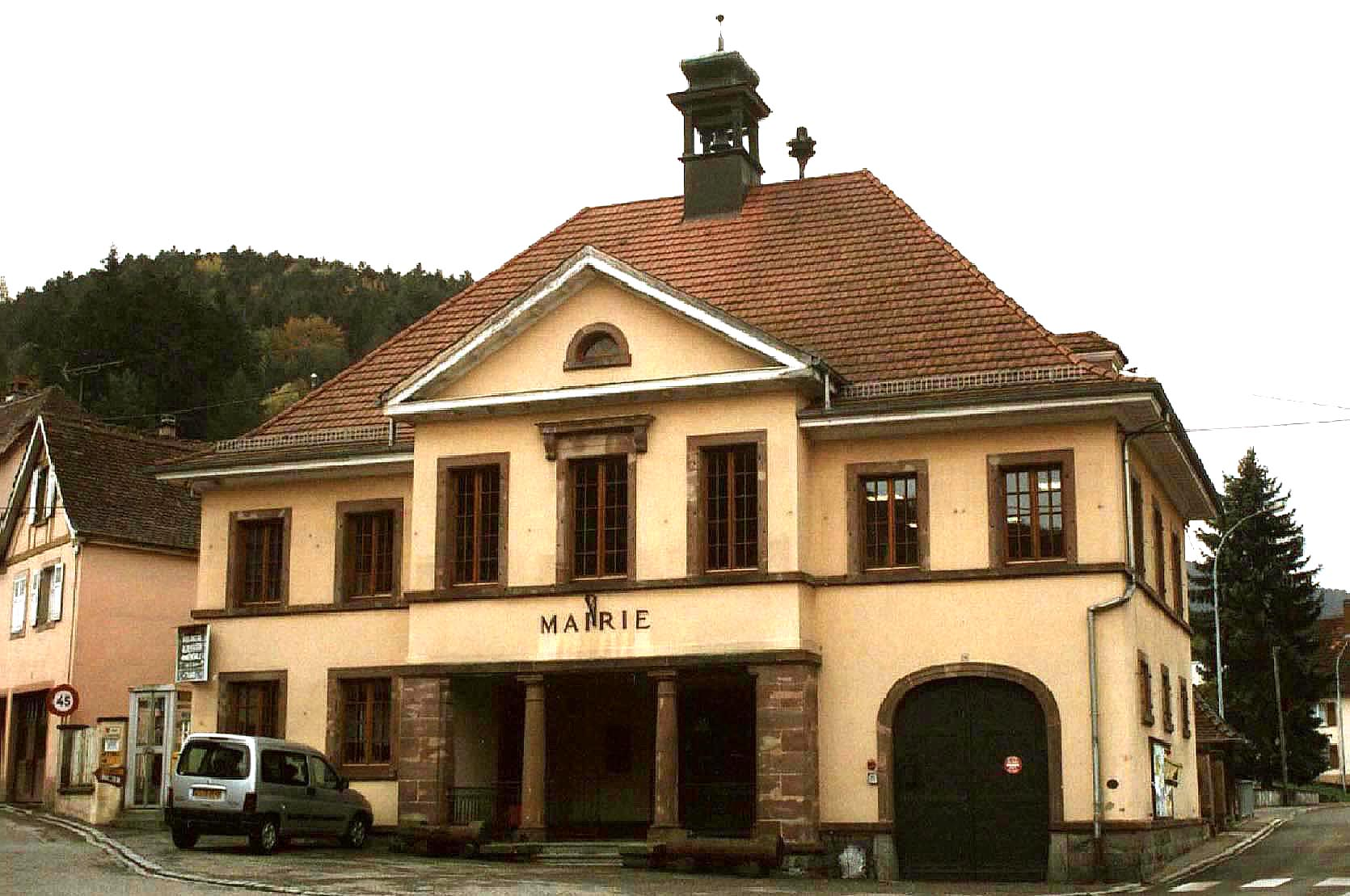 Mairie de Sondernach